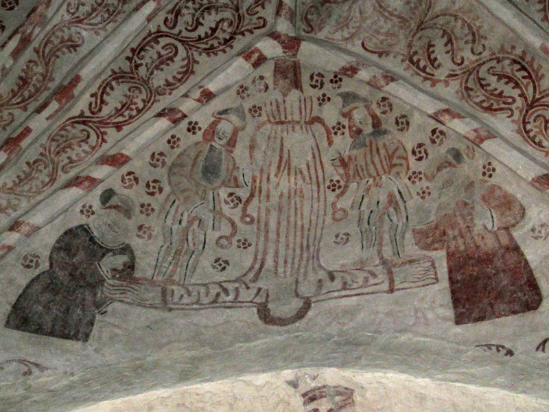 Takmålning med St Petrus